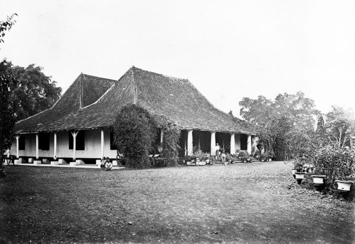 Foto. Album beslaat souvenir foto's van Java. Logement in Tjiandjoen in Preanger